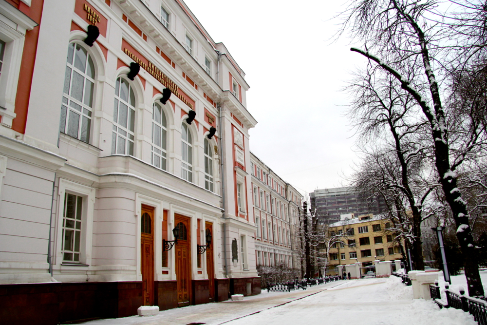 Moscow (Москва)